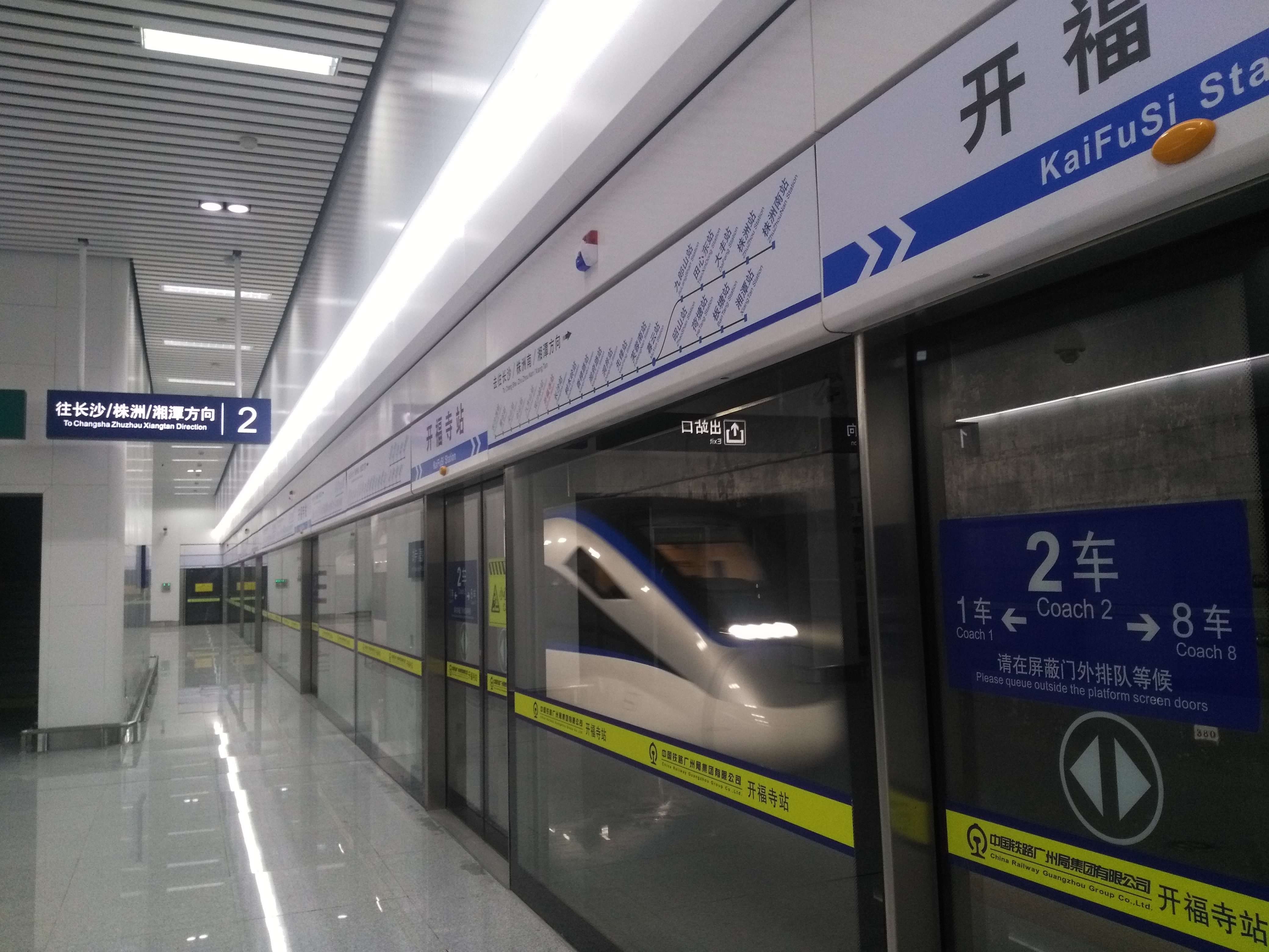 一列驶入开福寺站的长株潭城际铁路列车